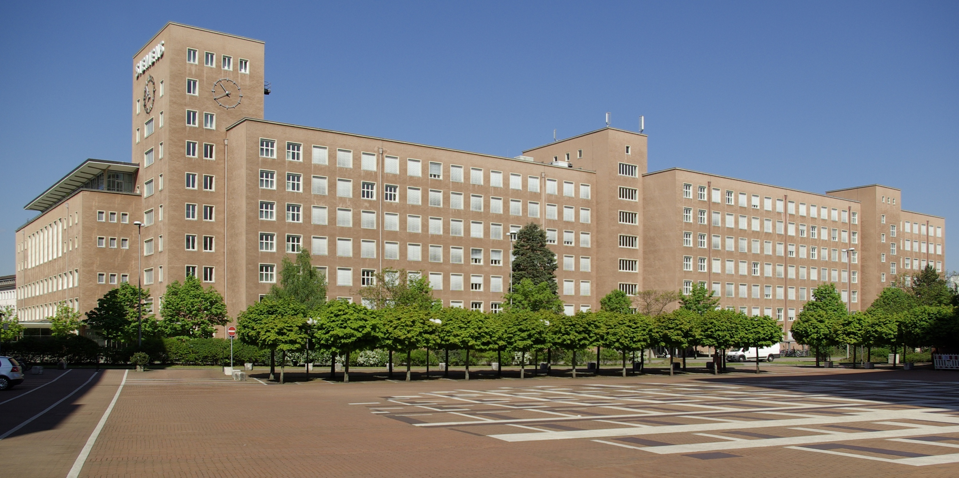 Das 1948 bis 1953 erbaute Verwaltungsgebäude der Siemens-Schuckertwerke (seit 1966 Siemens AG) in der Werner-von-Siemens-Straße 50 in Erlangen, Architekt: Hans Hertlein.